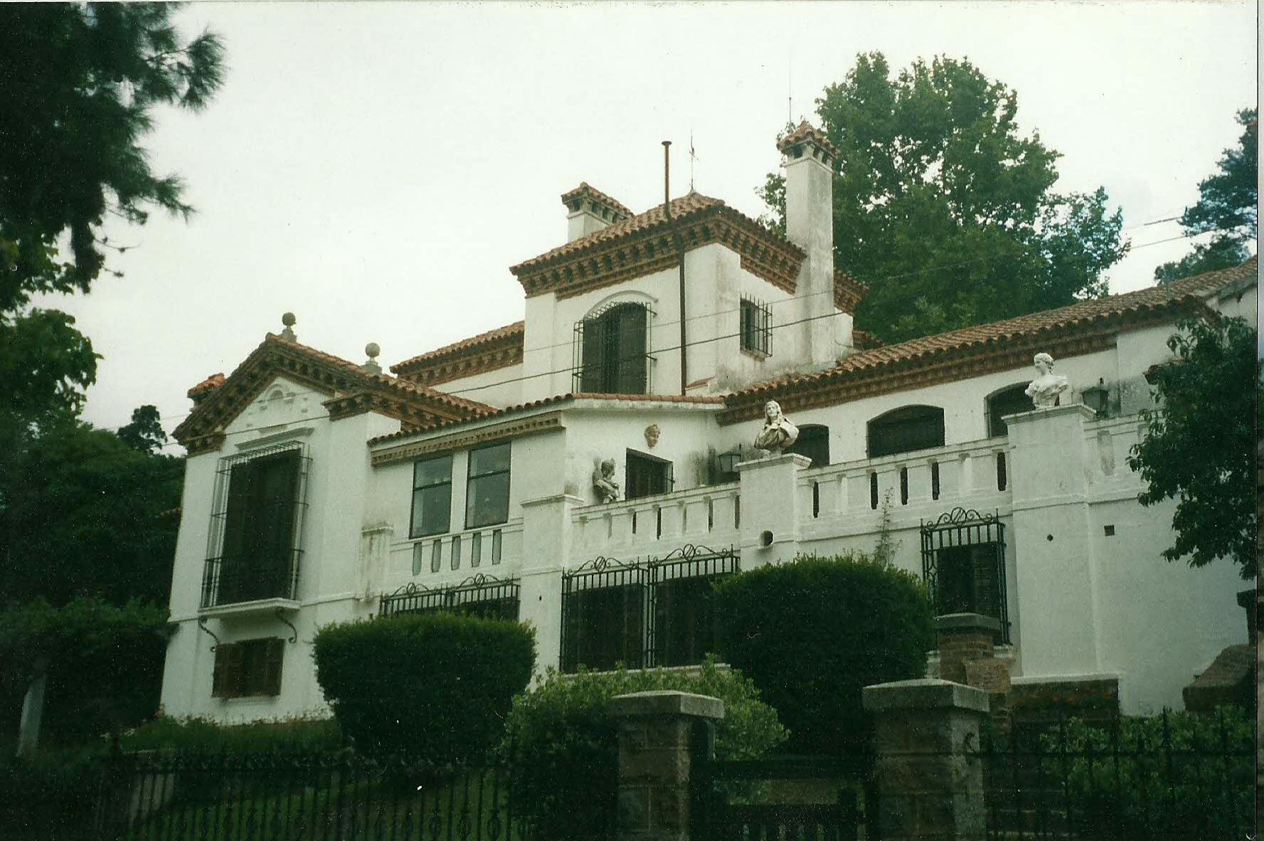 Edificio principal del Hotel El Descanso de Los Cocos.